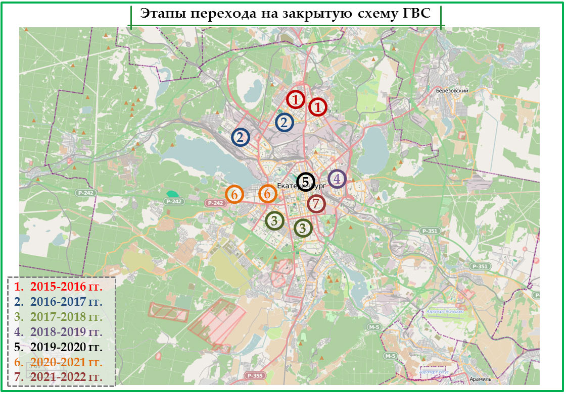 Планы по переходу на закрытую схему ГВС МО "город Екатеринбург" This map may be incomplete, and may contain errors. Don't rely solely on it for navigation.